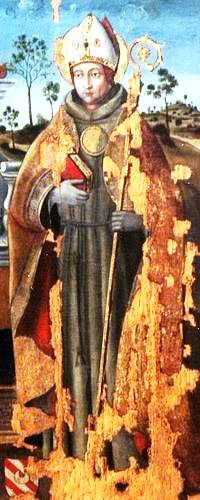 San Severino Abate - particolare della pala d'altare "Madonna con Bambino tra i Santi Severino Abate e Sossio Levita e Martire" (Protasio Crivelli, 1506 - Olio su tavola), dono del barone Luigi di Casalnuovo, conservata presso la Chiesa Matrice di San Giovanni Battista in Striano (Na).